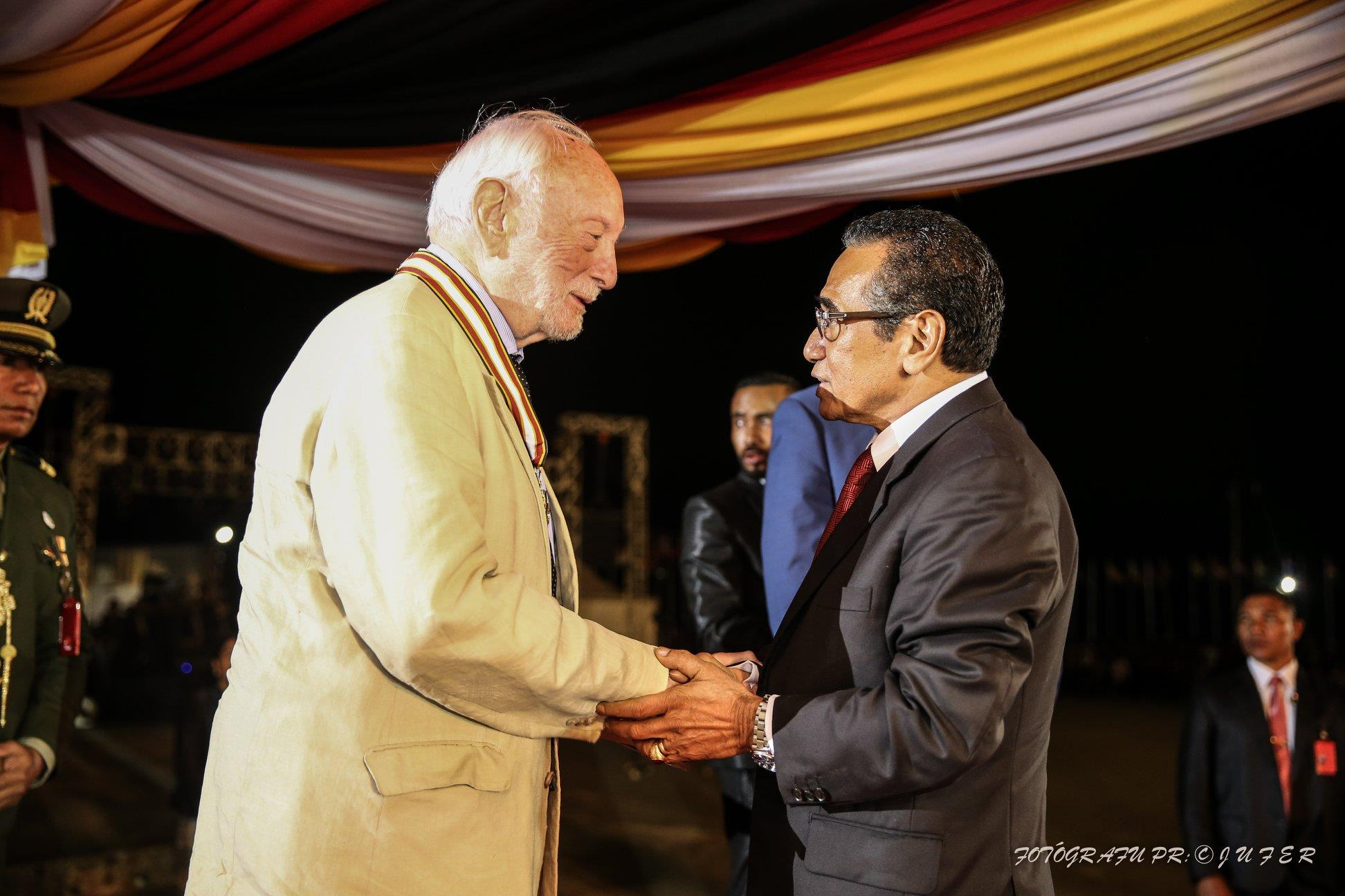 Francesc Vendrell bekommt den Ordem de Timor-Leste von Francisco Guterres bei den Feierlichkeiten zum zwanzigsten Jubiläum des Unabhängigkeitsreferendums.